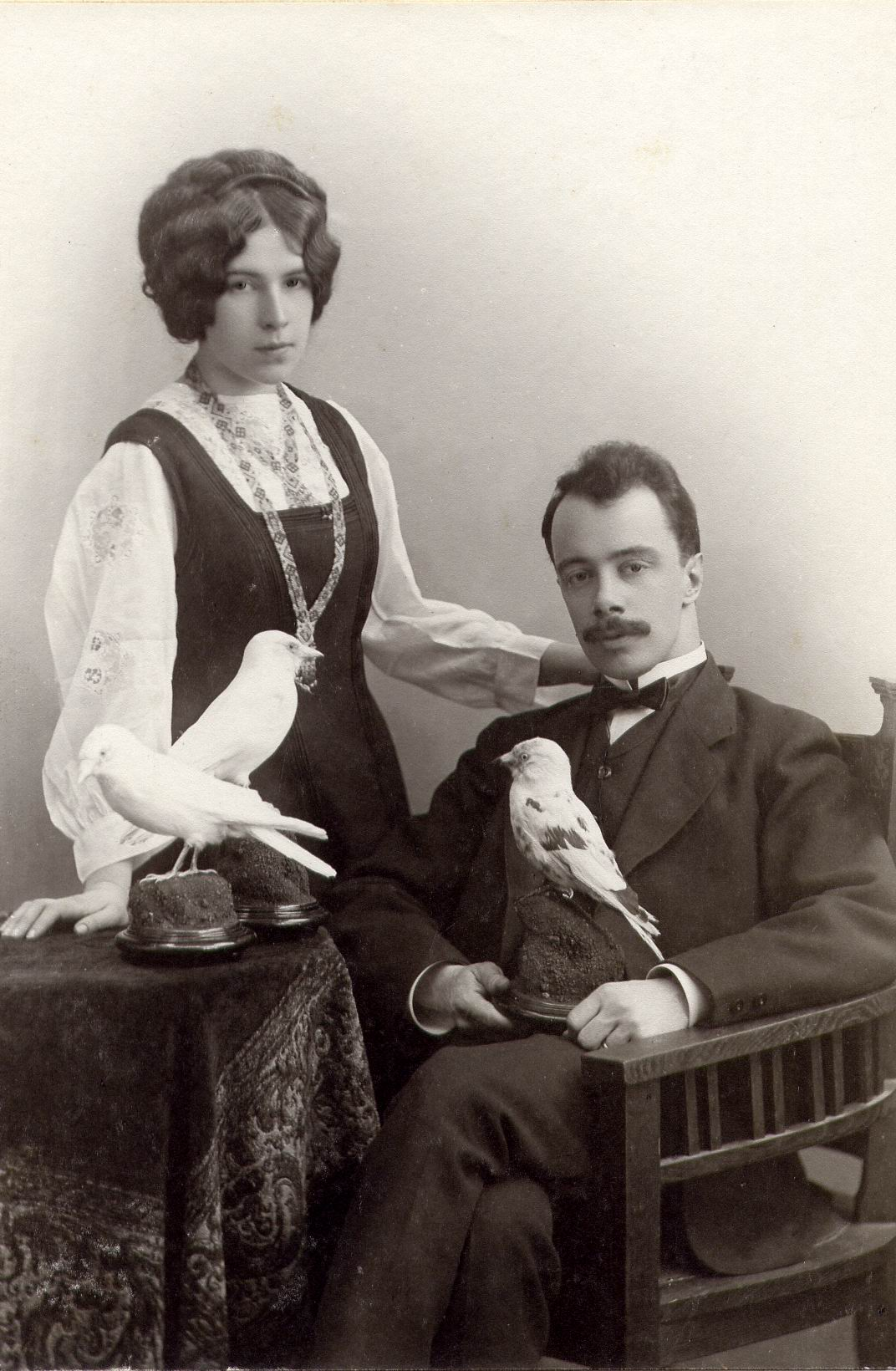 Основатели Дарвиновского музея/ А.Ф.Котс_и_Н.Н.Ладыгина_с_галками